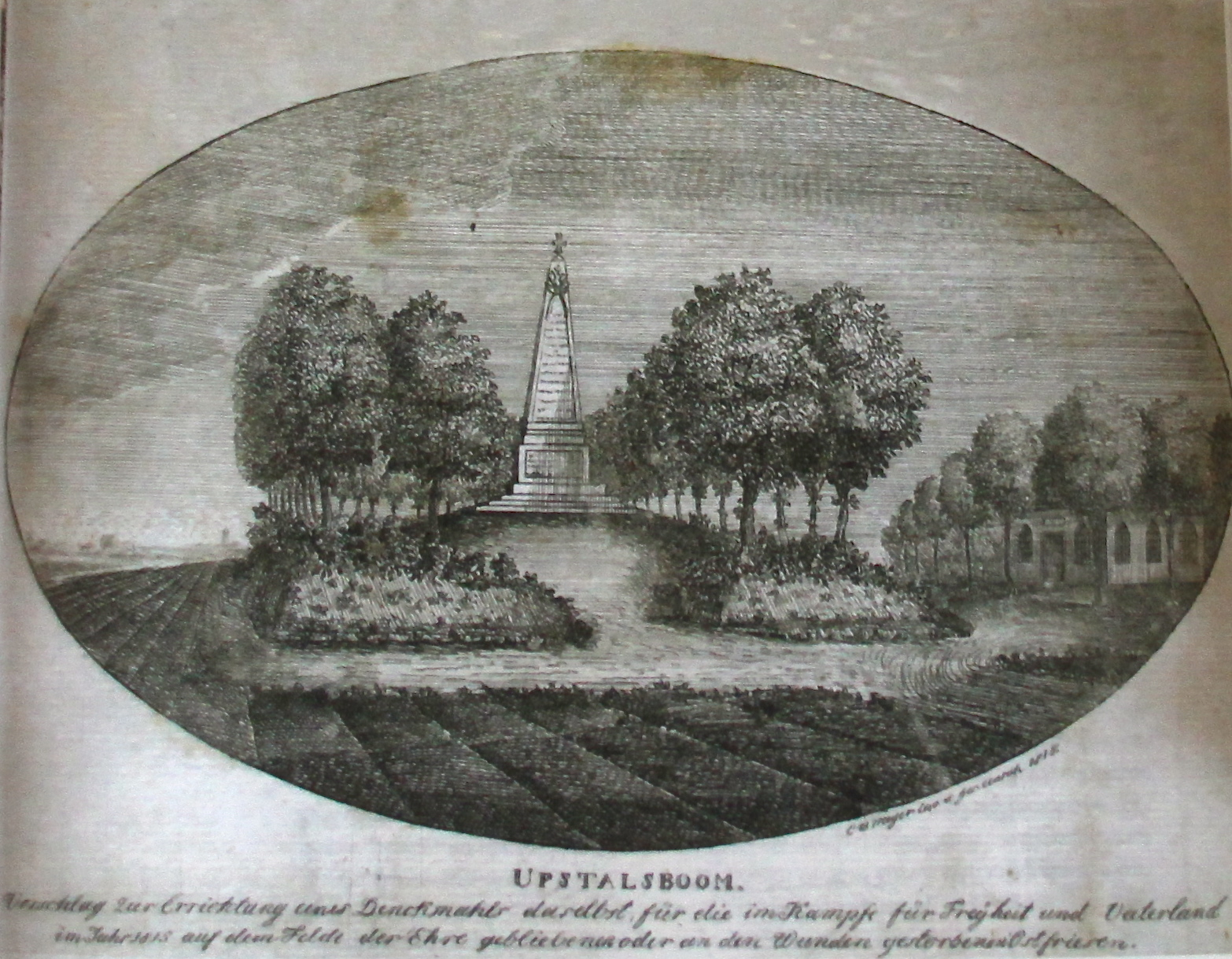 Flugblatt der Bürgerinitiative für ein Kriegerdenkmal am Upstalsboom aus dem Jare 1815 mit einer Zeichnung von Conrad Bernhard Meyer